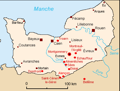 Carte de la Normandie ducale avec les lieux liés aux Montgommery